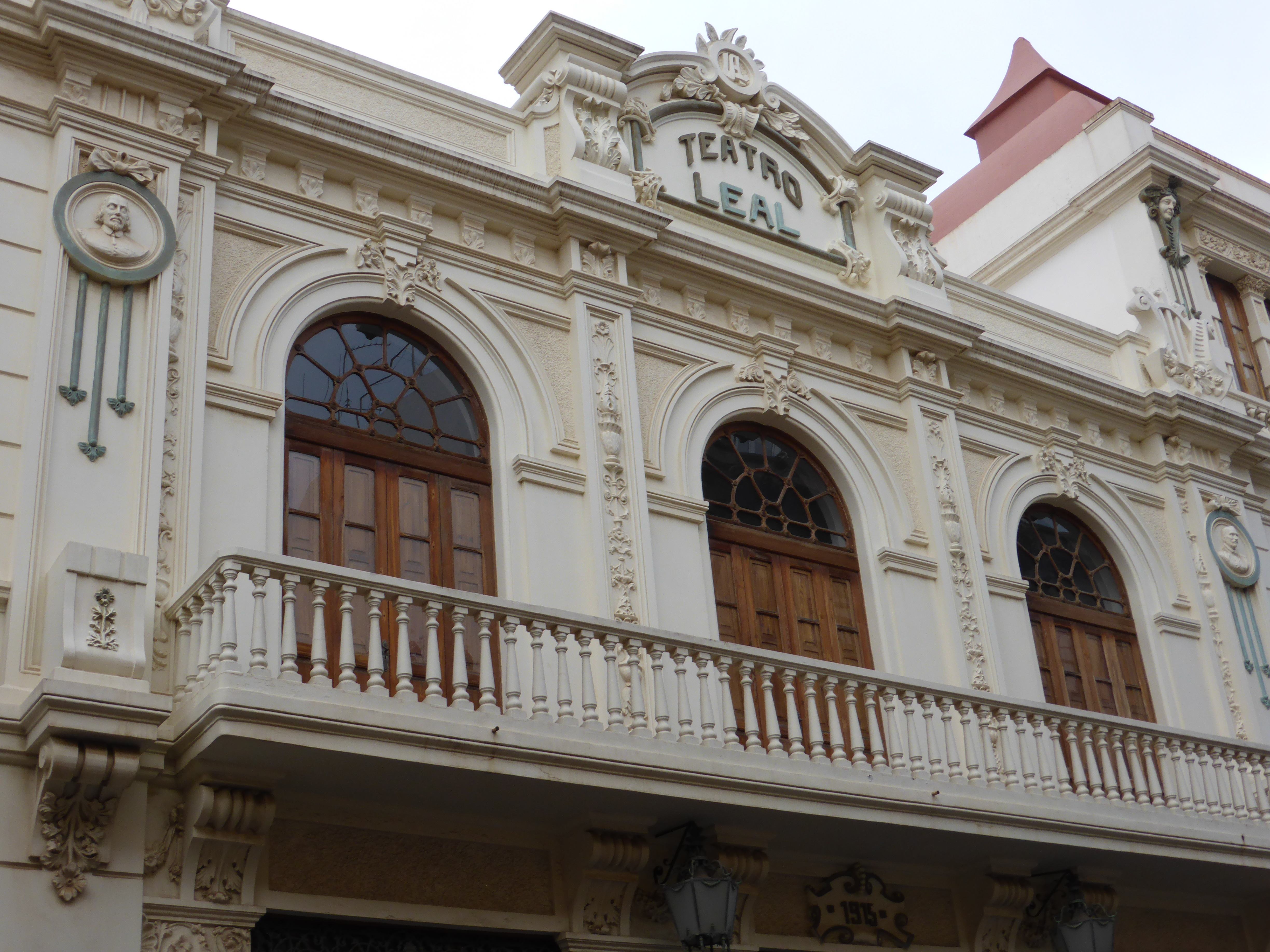 El Teatro Leal fue construido en el año 1915. En los años 20 (del siglo XX), se proyectaban películas mudas. Aquí se estrenó el primer largometraje de Canarias, la película de acción titulada: "El ladrón de los guantes blancos", el 6 de septiembre de 1926. Fue producida y co-dirigida por el entonces gerente del Teatro Leal, José González Rivero ("Rivero Film").